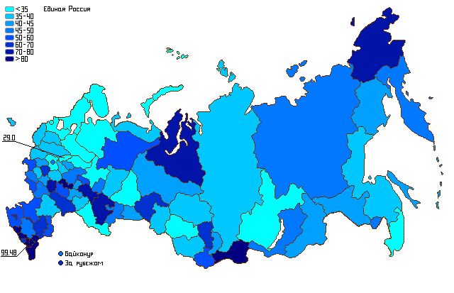 Результат Единой России на парламентских выборах 2011 года